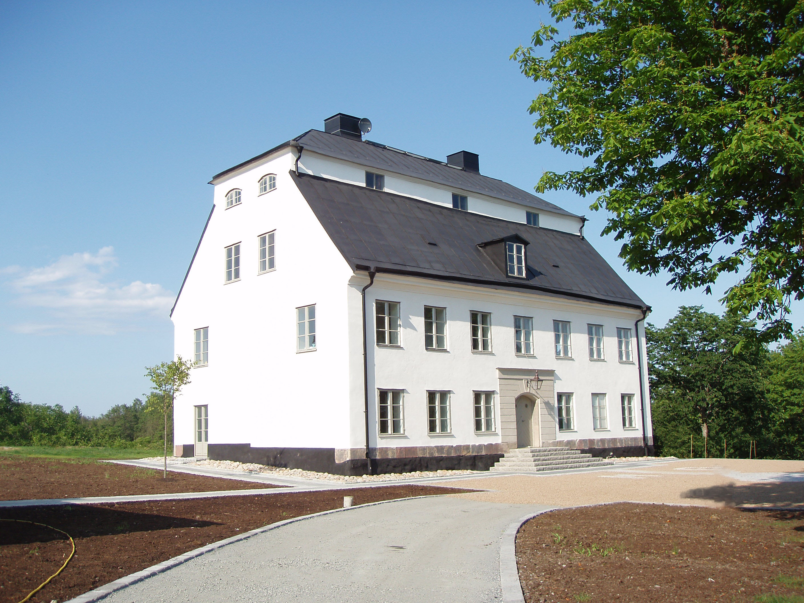 Marums gård, Ljusterö, Österåkers kommun. Huvudbyggnaden.